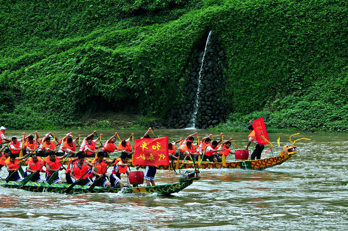 龙江龙舟赛